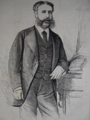 José Isidro Osorio y Silva-Bazán, conocido como Pepe Osorio. Duque de Alburquerque, Algete y Sesto